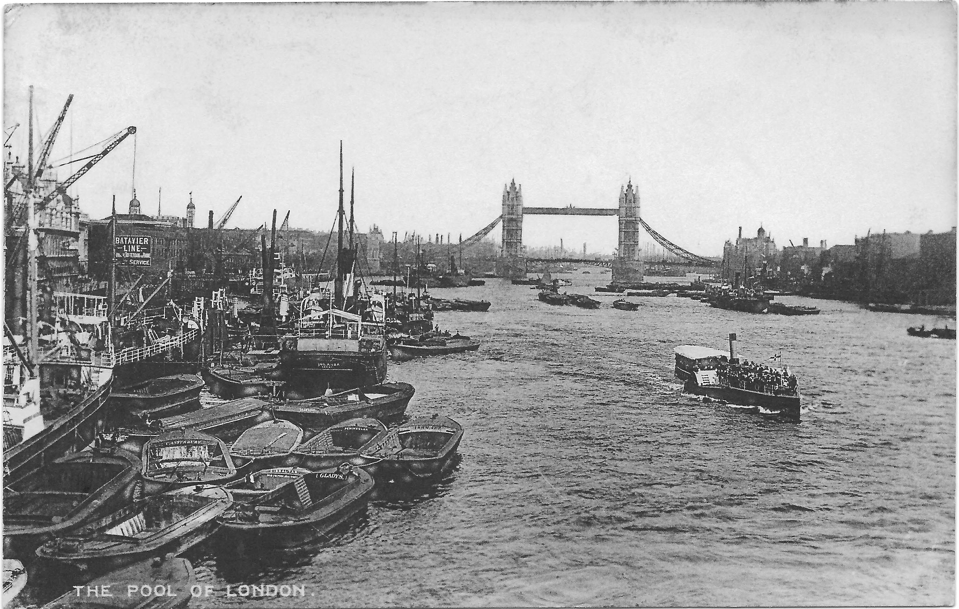 De drukke rivierbank van de Thames in Londen